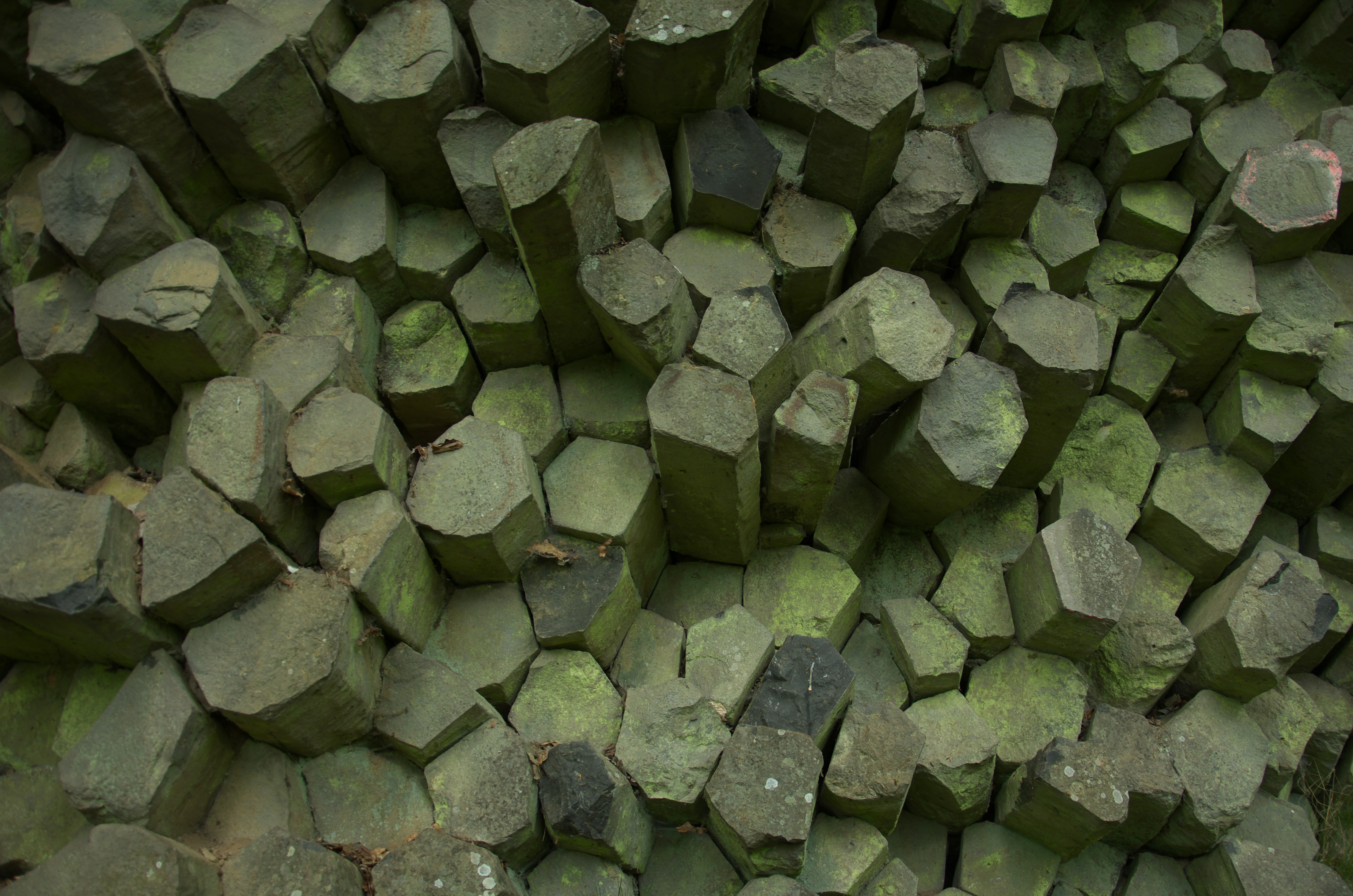 Ausschnitt aus der Basaltprismenwand im Naturschutzgebiet „Gangolfsberg“ (Bayern)